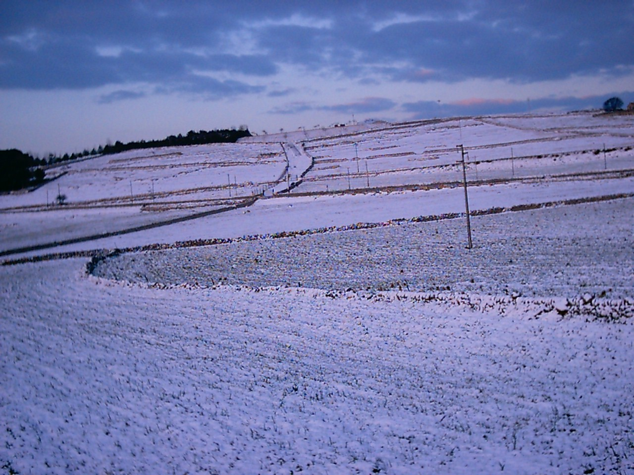 Monti Iblei innevati inverno 2003